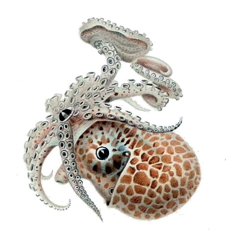 Argonauta sp.